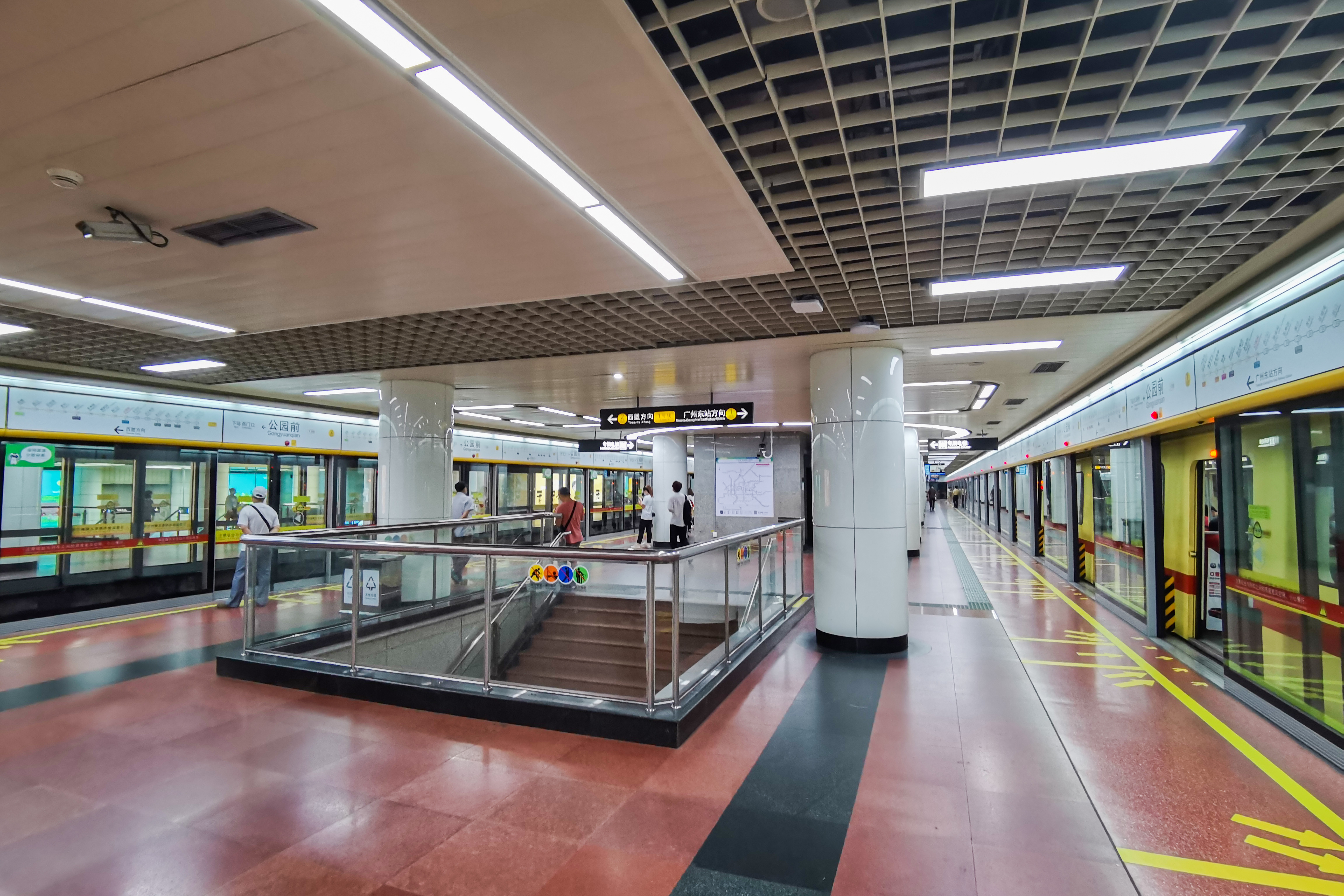 广州地铁公园前站